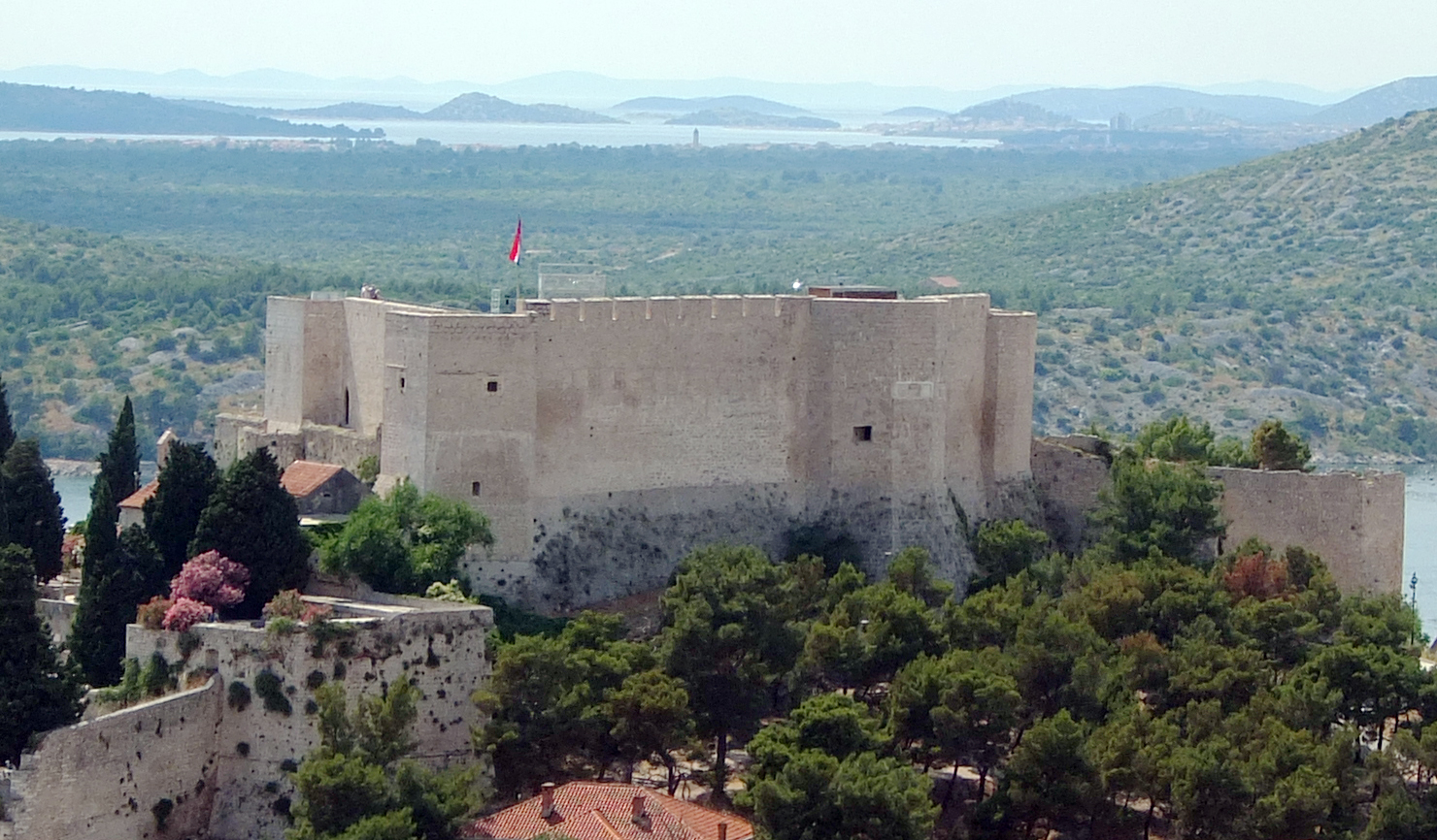 Srpskohrvatski / српскохрватски: Pogled na tvrđavu svete Ane s tvrđave Barone u Šibeniku